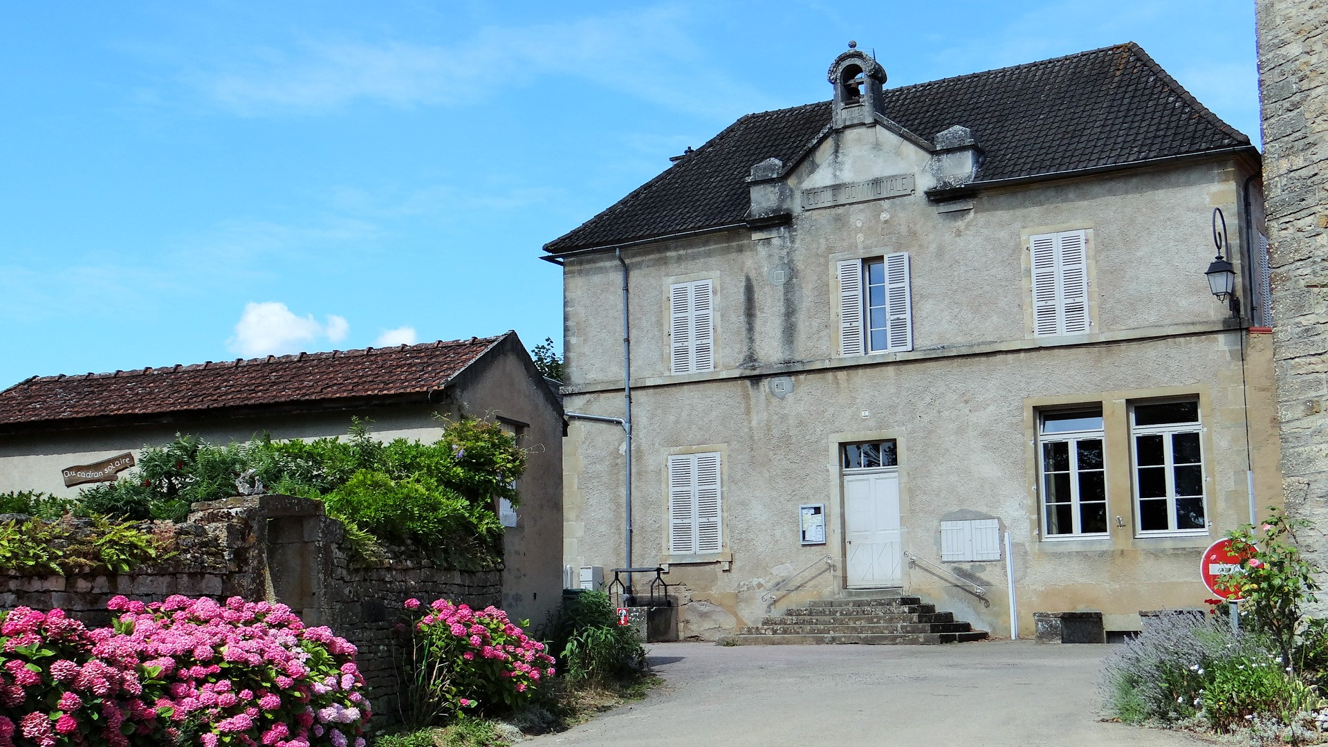 École de Thisy